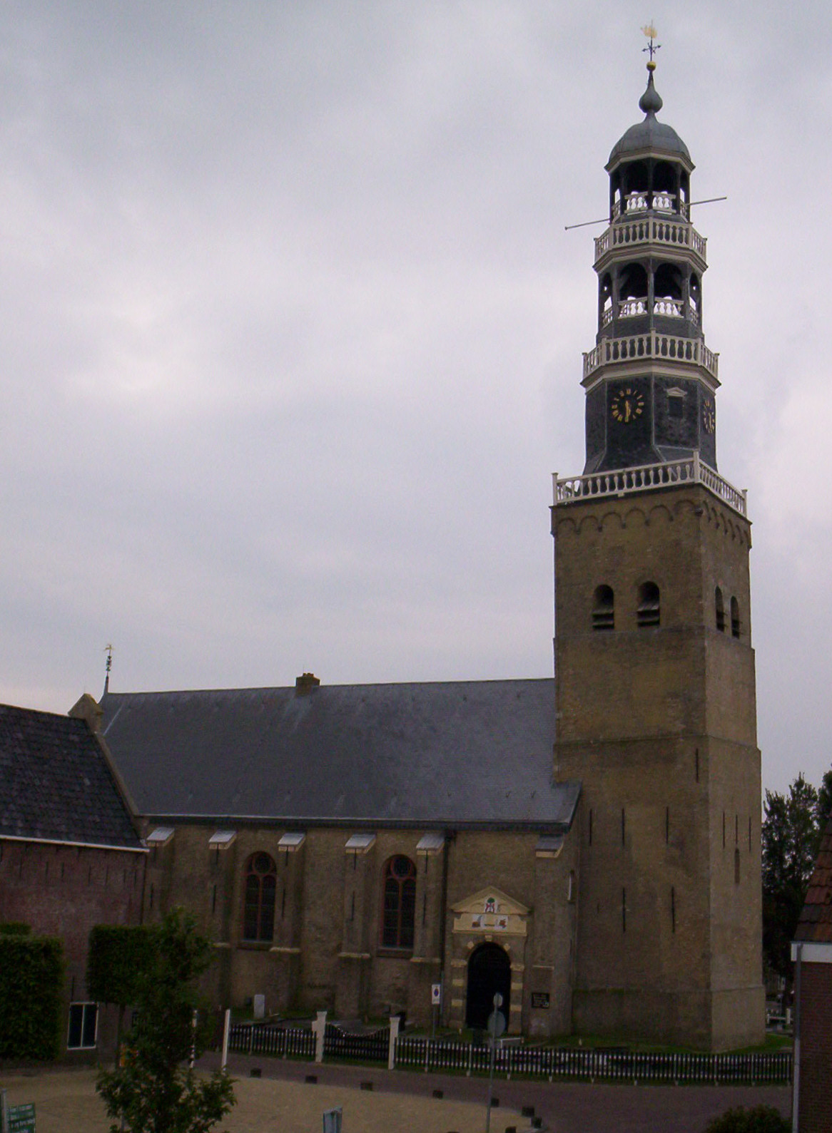 A hindeloopeni nagytemplom, Hollandia